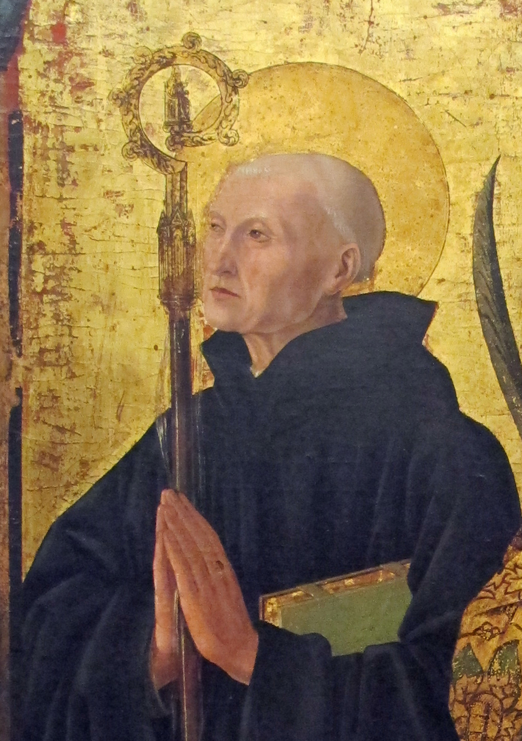 Darstellung des Severin von Noricum. (Detail aus dem Severinaltar in Neapel)